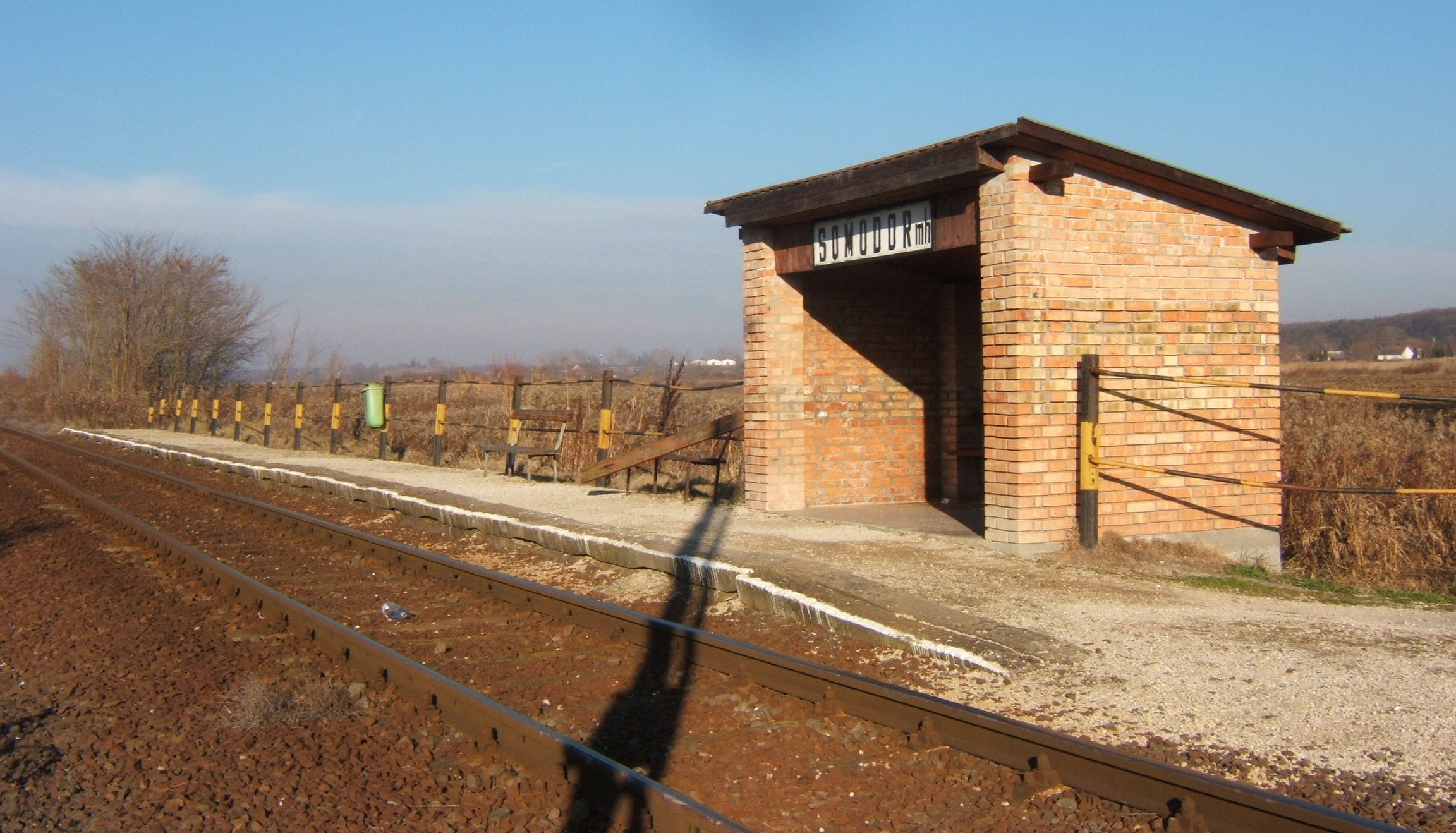 Somodor, vasúti megállóhely